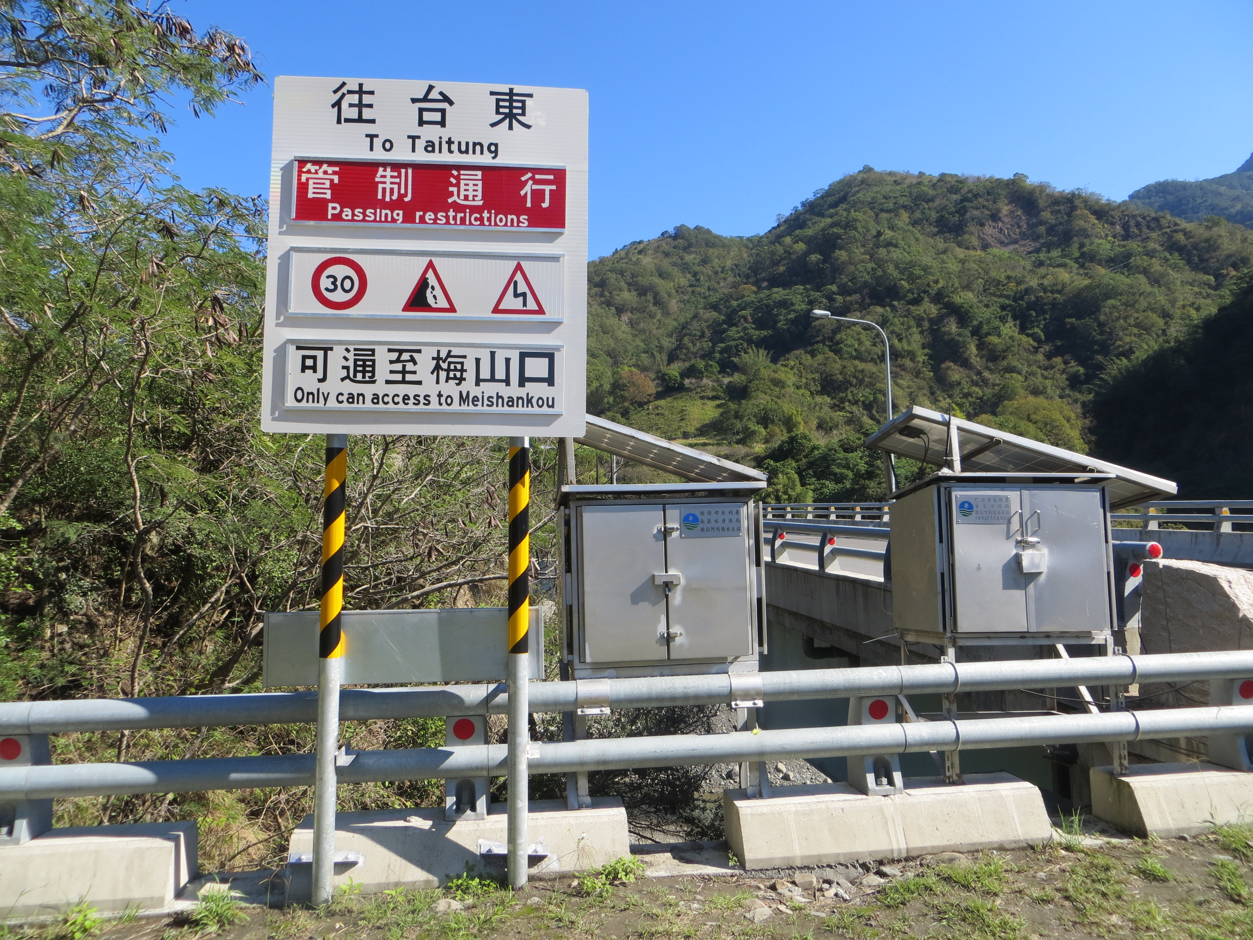 路況告示板是用以告知欲經由此路的用路人，前方路況如何的工具。此為放置於南橫公路撒拉阿塢橋南端的路況告示板，以圖示、文字表示南橫的高風險路況，且仍未能全通至台東；照片右側即撒拉阿塢橋與經濟部水利署南區水資源局暨第七河川局設施。